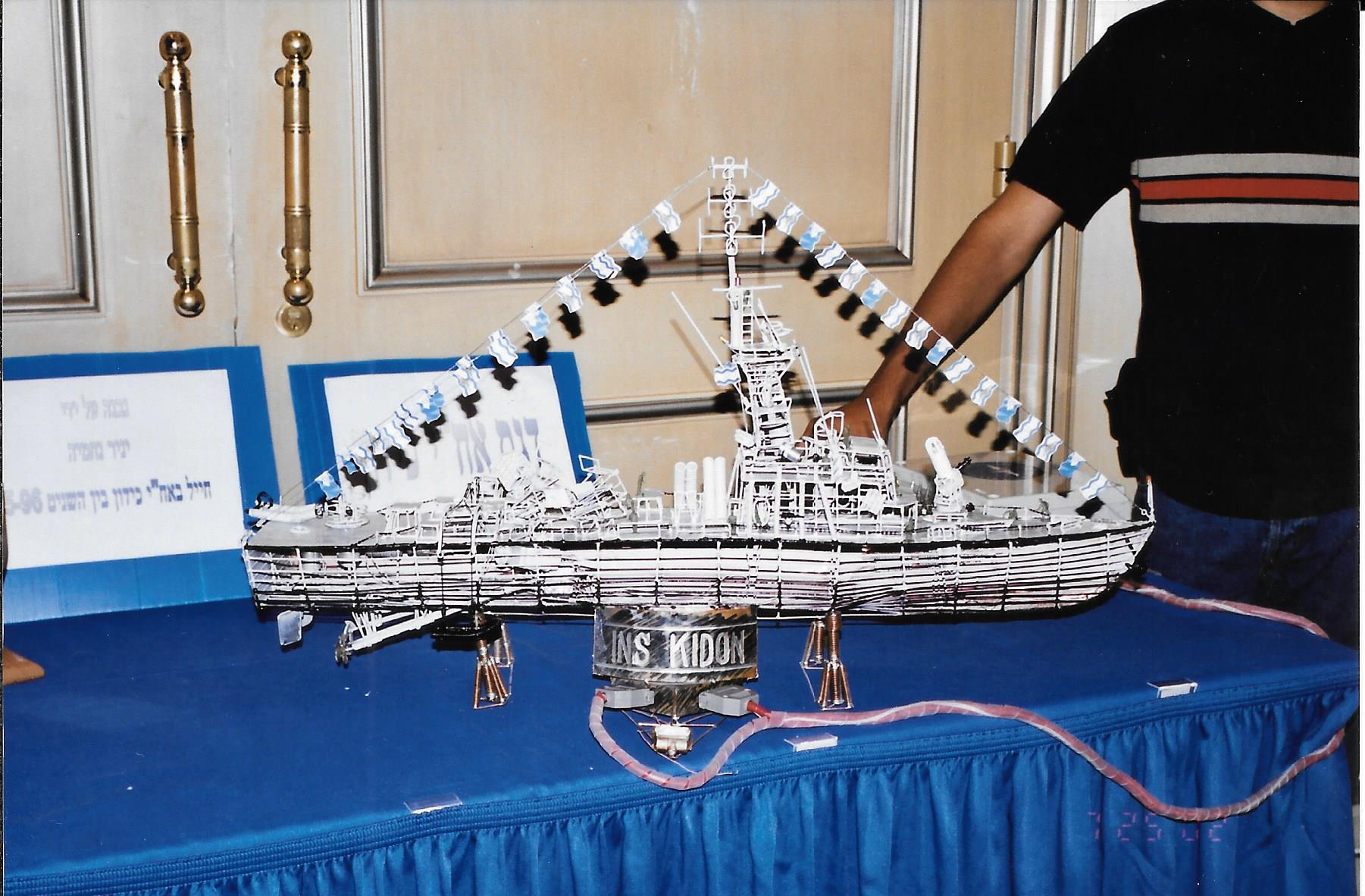 דגם ספינת הטילים אח"י כידון שנבנה על ידי ותיק הספינה נחמיה יניר למפגש הותיקים 26 ביולי2002